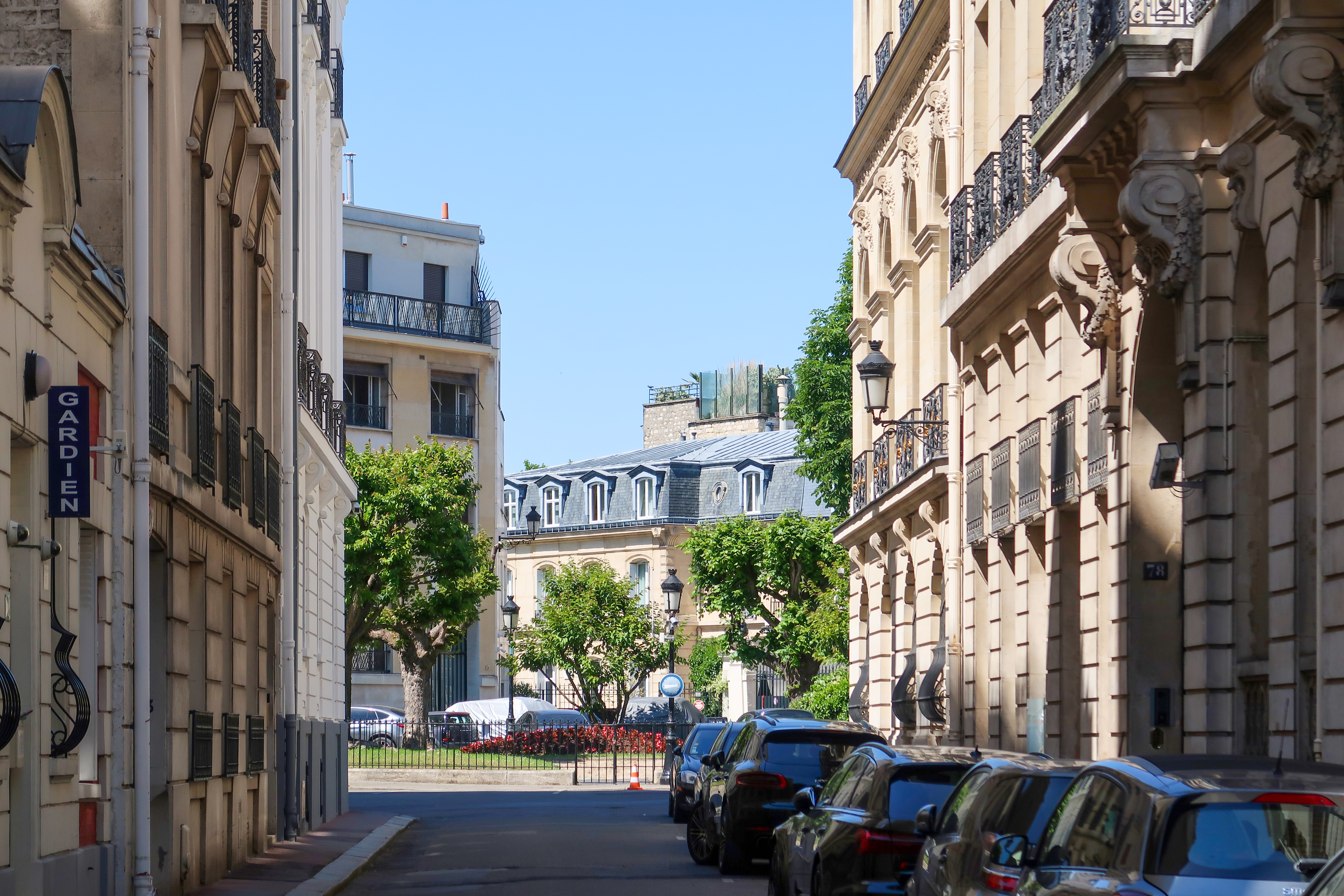 Square de l'Avenue-Foch (Paris, 16e).